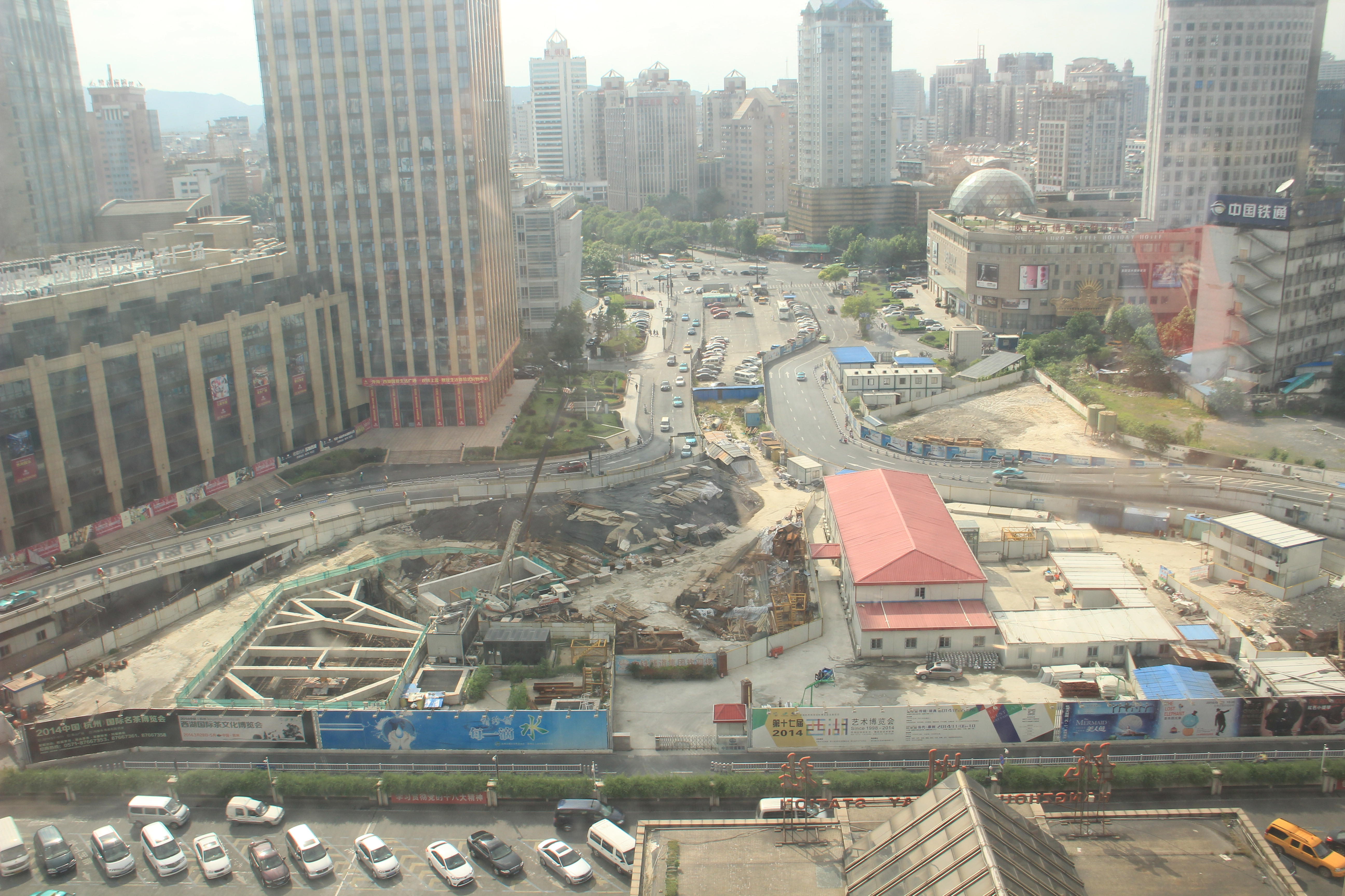 中文（中国大陆）: 杭州地铁5号线城站站基坑高空俯瞰